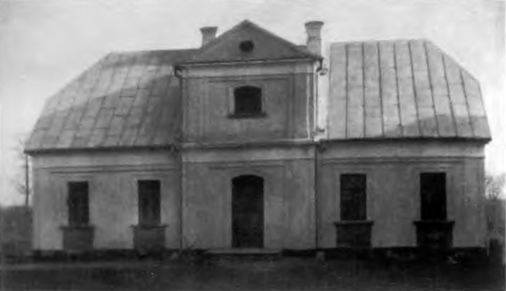 Беларуская (тарашкевіца): Воўчын (Voŭčyn). Плябанія